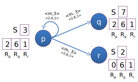 Estructura de la multidifusión fiable